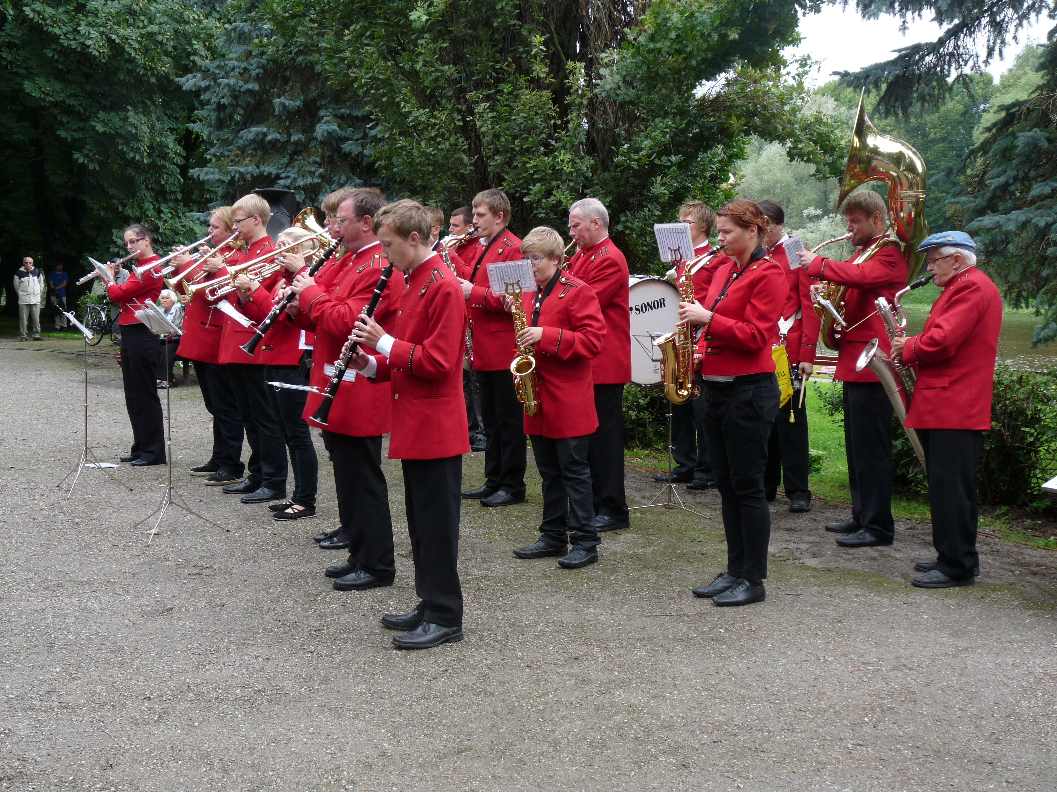 Puhkpilliorkester Tartu esinemas Eesti taasiseseisvumispäeva tähistamisel Tartu vabadussamba juures, 20. august 2012